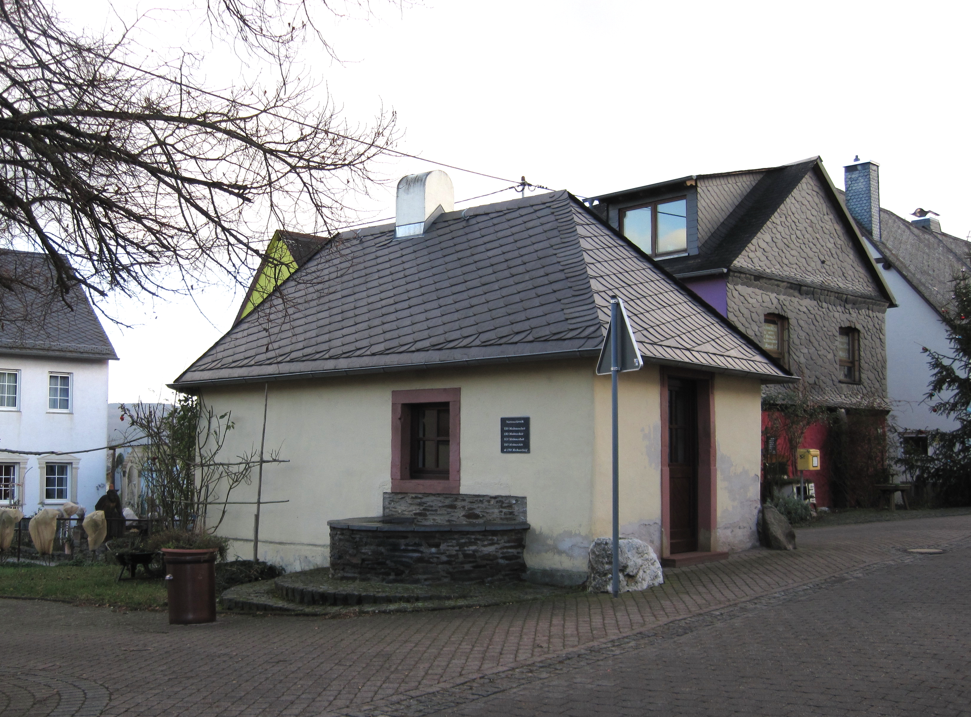 Ehemaliges Backhaus ("Backes") in Bacharach-Medenscheid